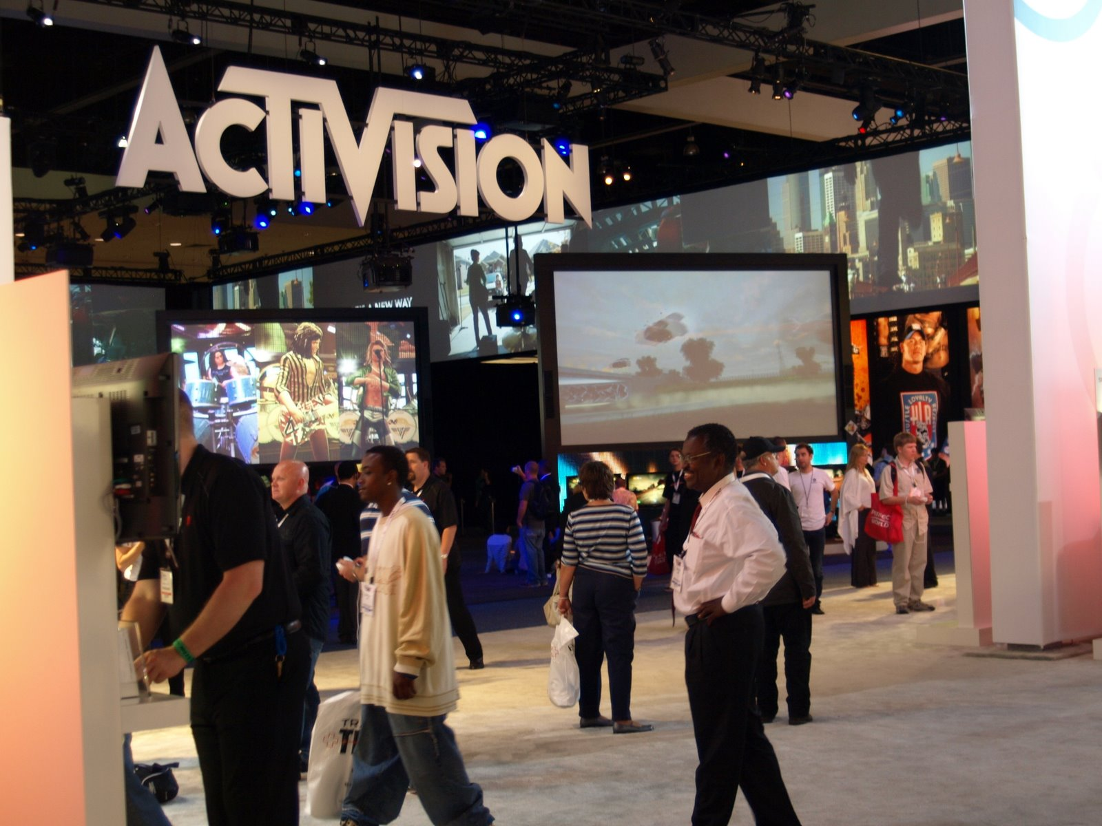 Stand de la compañía de videojuegos Activision durante el E3 2009, celebrado en el Convention Center de Los Angeles (EEUU).